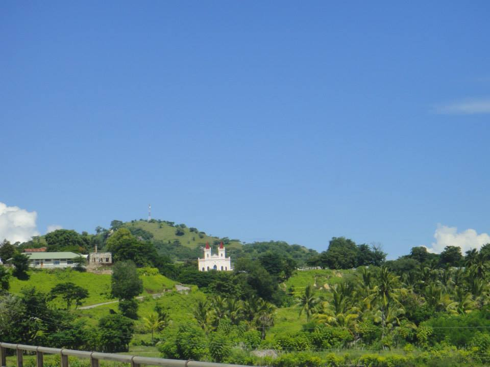 A caminho de manatuto antes de Laleia